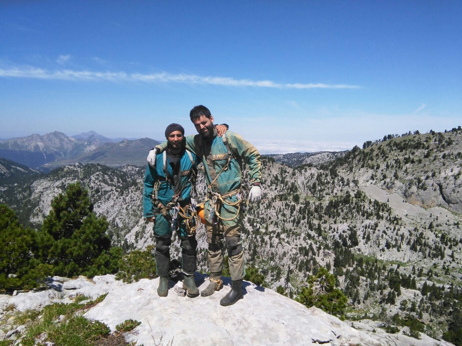 Espeleologoak Larrako mendigunean (Nafarroa-Baretous-Zuberoa). 2018ko kanpaina.